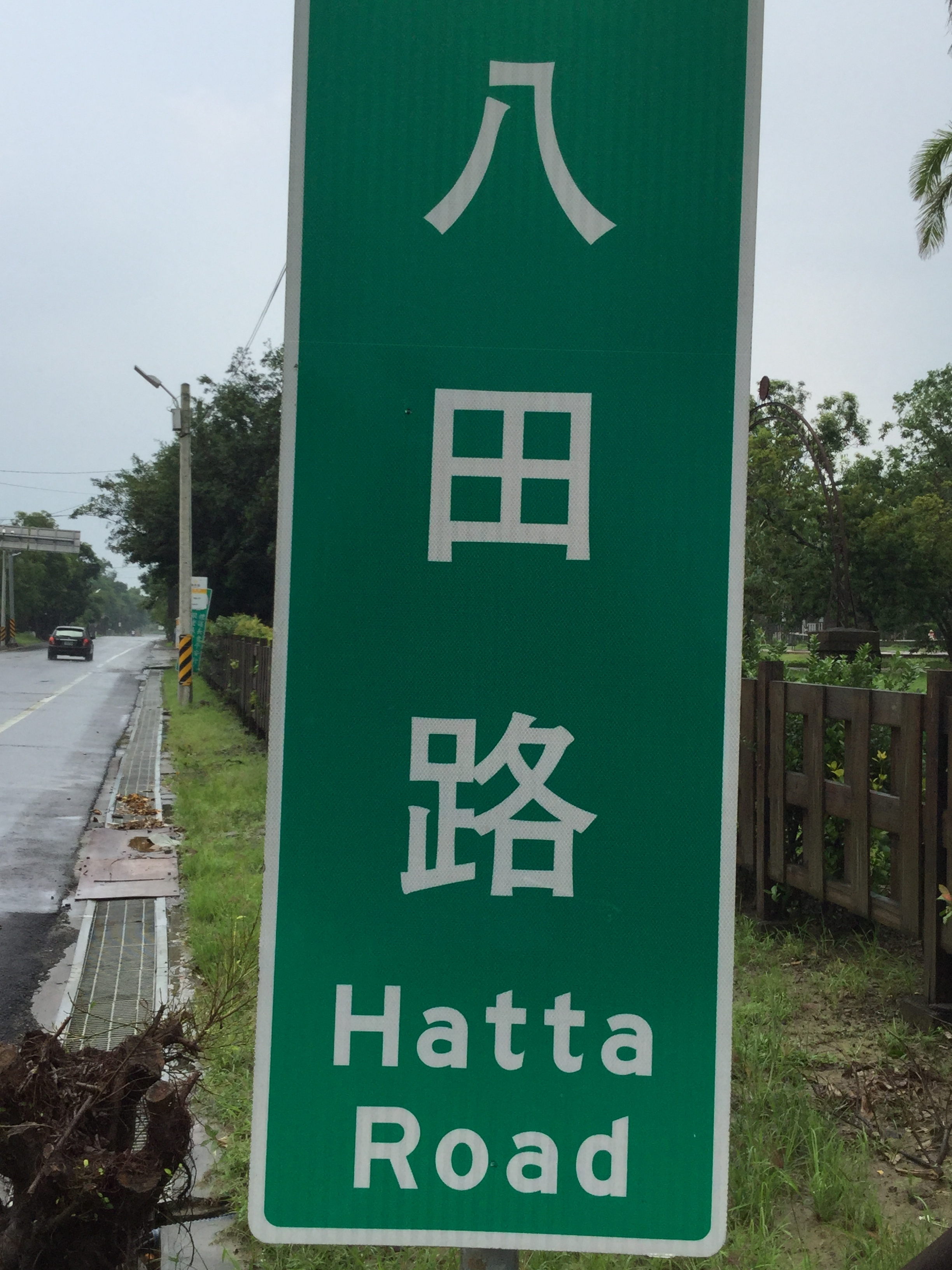 台南市官田區的八田路